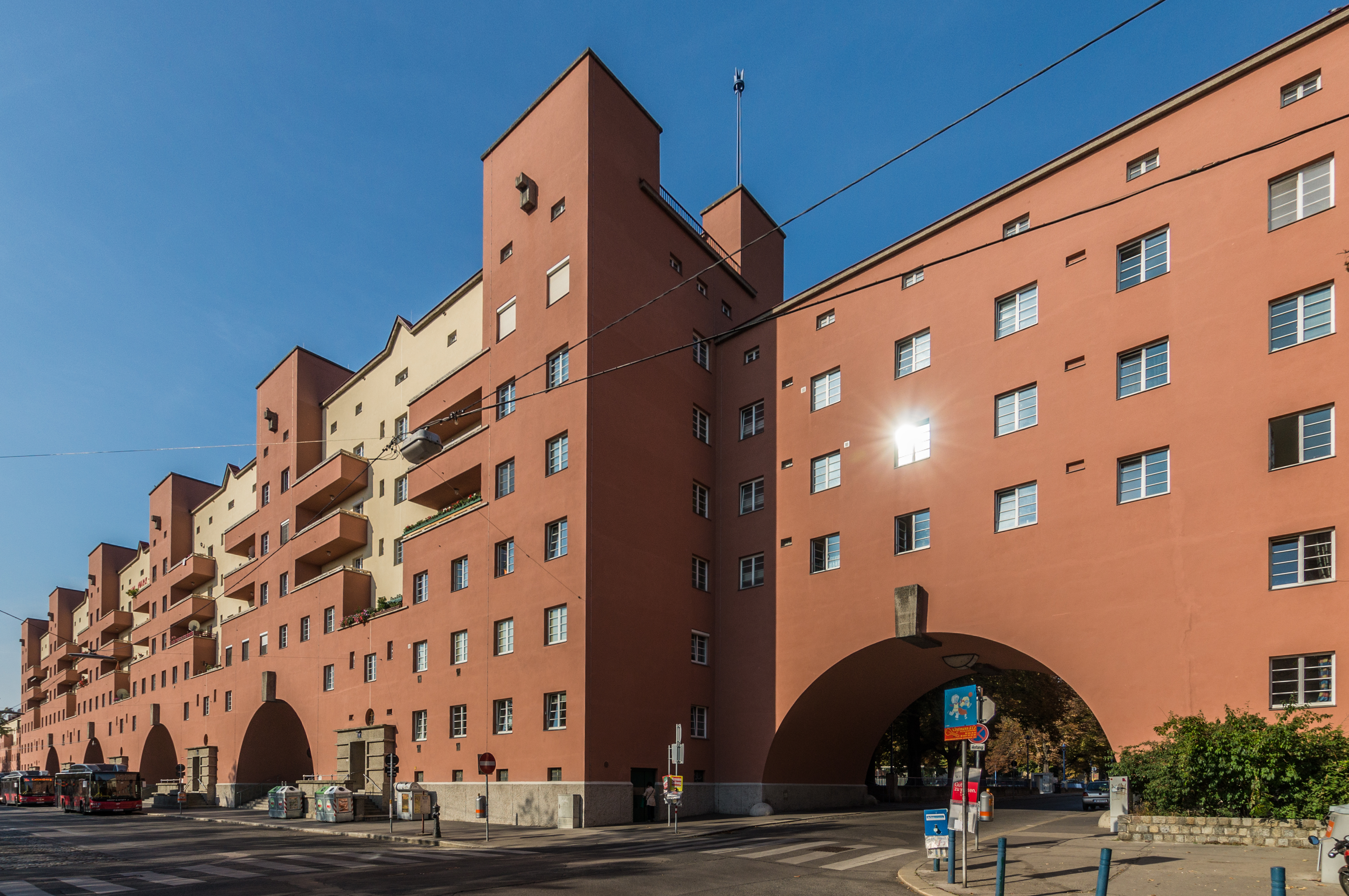 Karl-Marx-Hof Karl-Marx-Hof Fassade zur Boschstraße This media shows the Vienna residential building (Gemeindebau) with the ID 220.